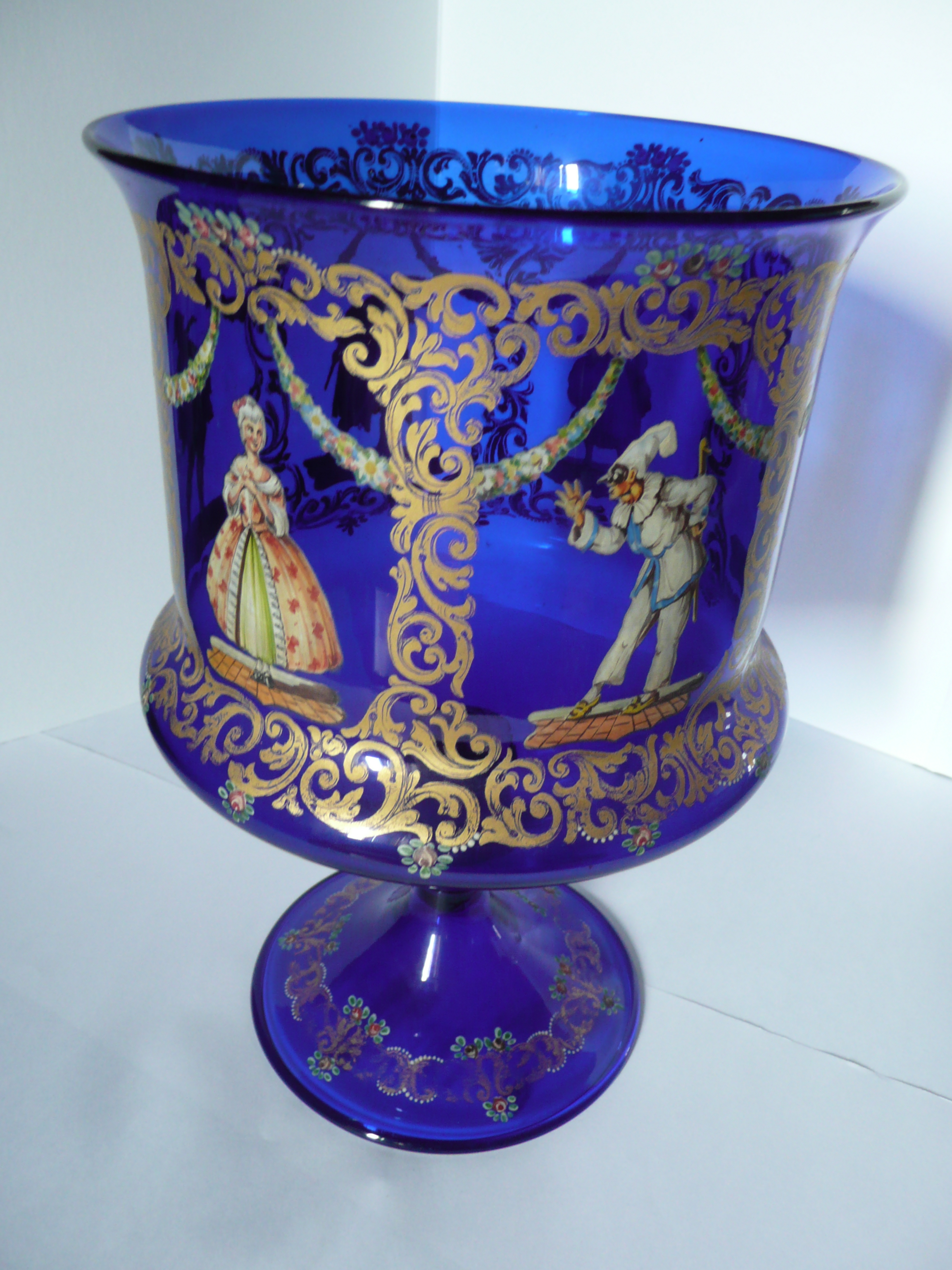 Coppa decorata con maschere del carnevale in vetro di Murano